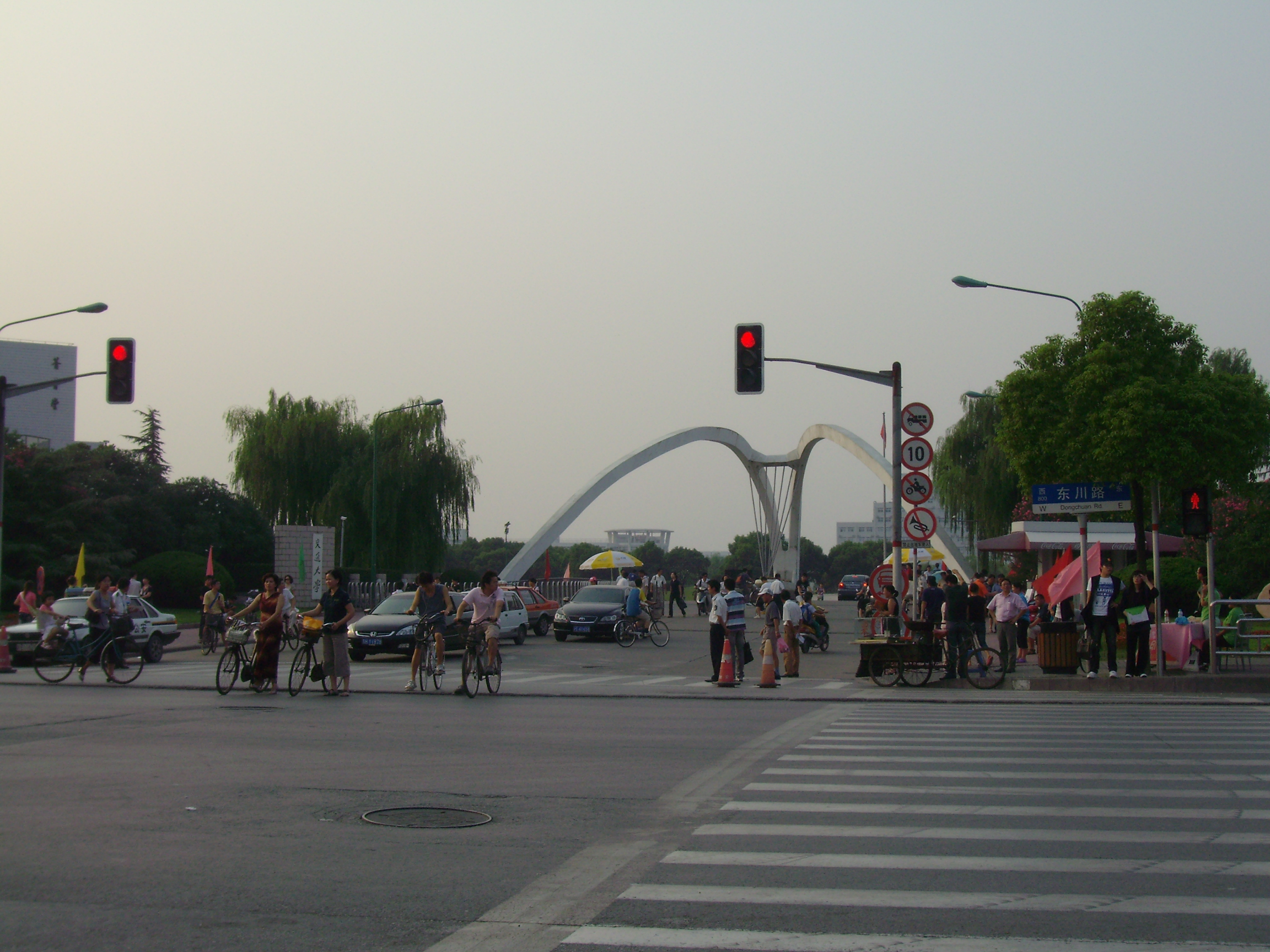 上海交大闵行校区